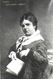 Maria Alinda Bonacci Brunamonti (1841-1903)